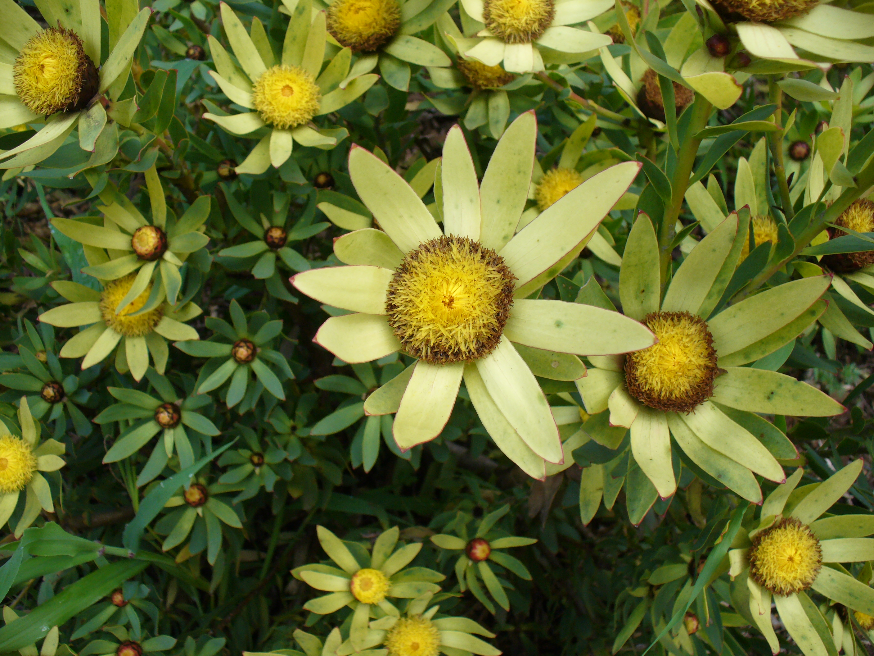 Kirstenbosch Gardens